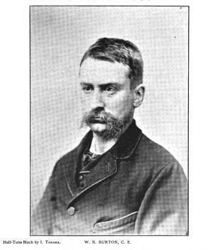 威廉 巴爾頓